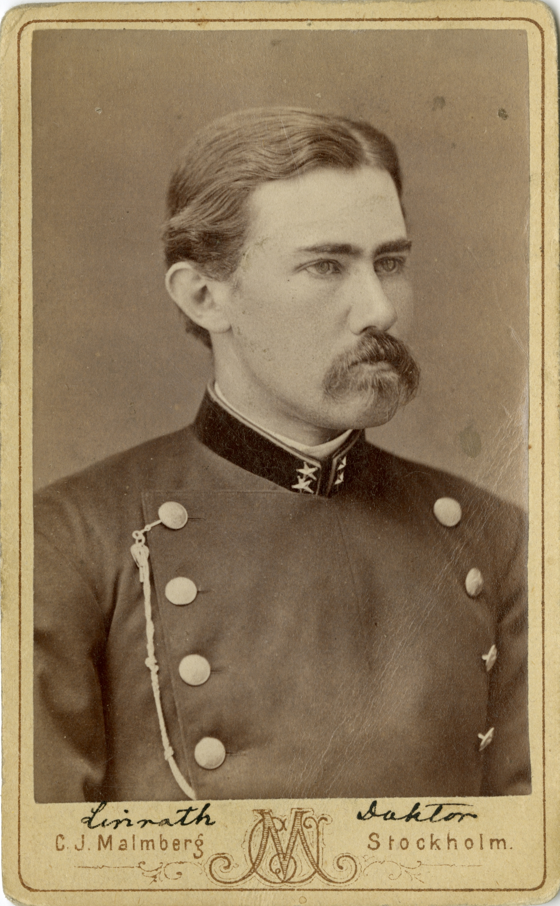 Porträtt av professor och läkare Klas Mauritz Linroth.